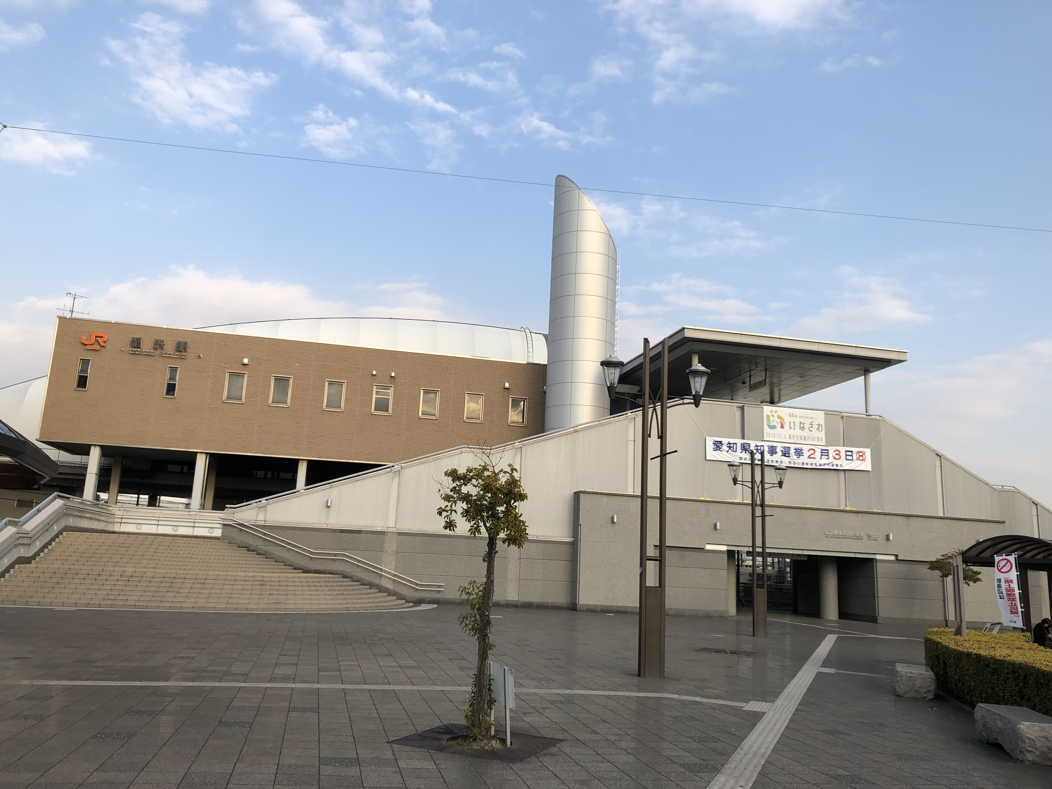 稲沢駅駅舎